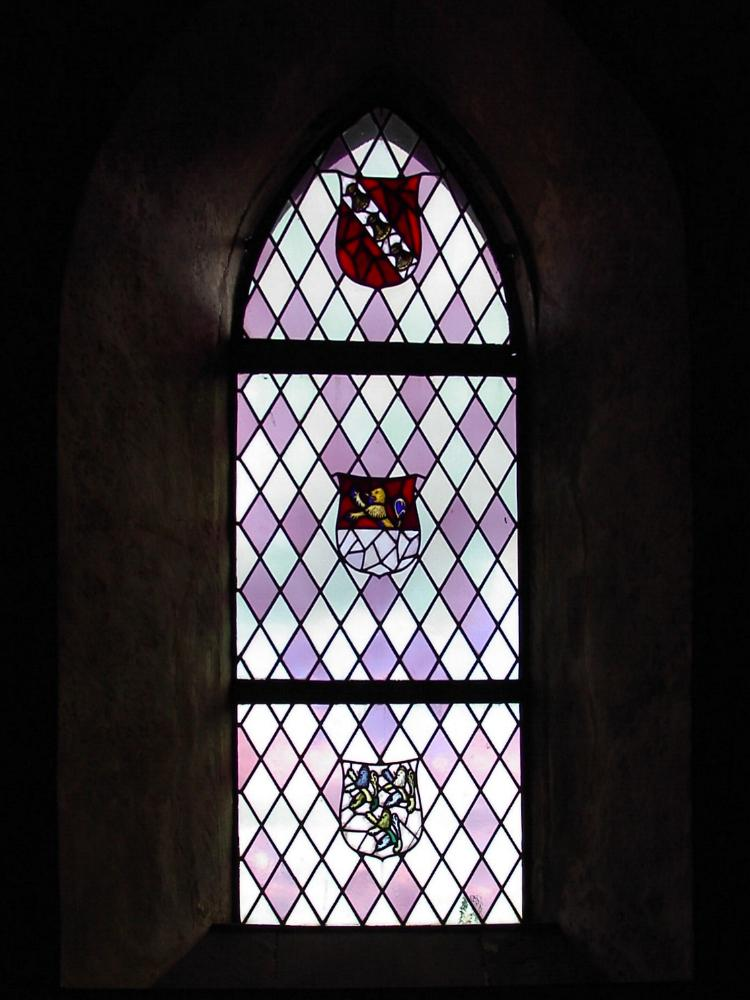 Fënster an der Klierwer Kapell vun der Munzer Kierch. Photo vum User Pear 15:50, 20 August 2006 (UTC). Munzen Kategorie:Gemeng Munzen